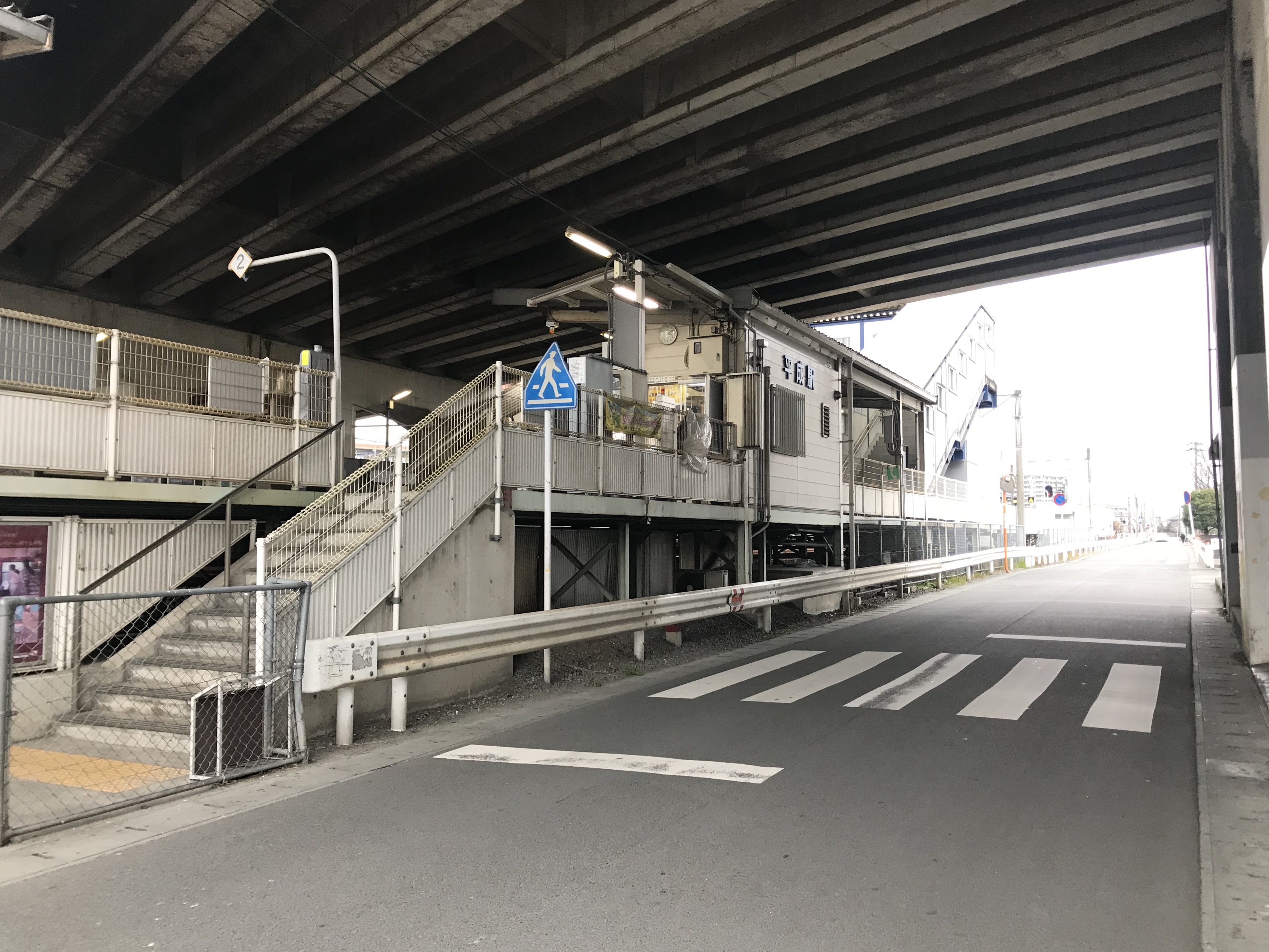 平成駅の駅舎